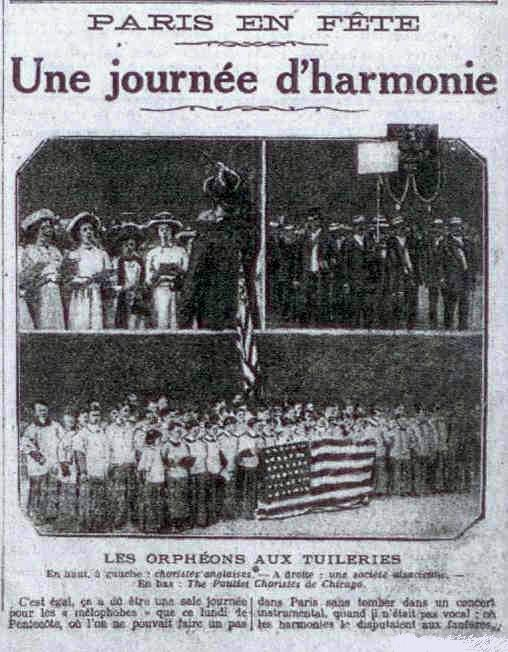 La fête, concours et rassemblement musical et orphéonique du lundi de Pentecôte 27 mai 1912 à Paris.